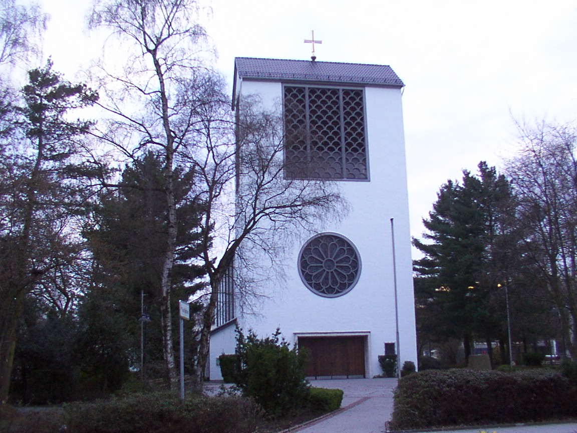 Paderborn: katholische Kirche Sankt Michael in Sennelager